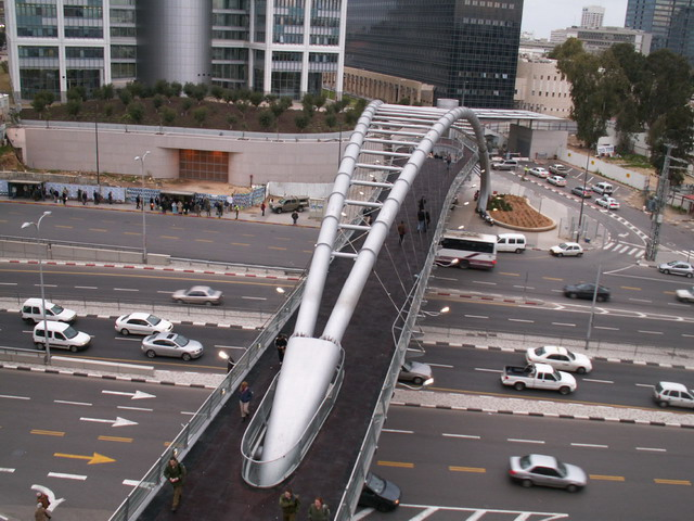 מרכז עזריאלי ת"א Azriely Towers - Tel-Aviv - Israel צולם על-ידי אבי קדמי ב- 2006.